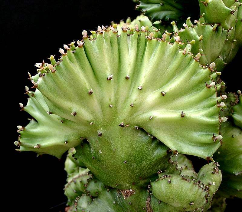 Euphorbia lactea fa. cristata